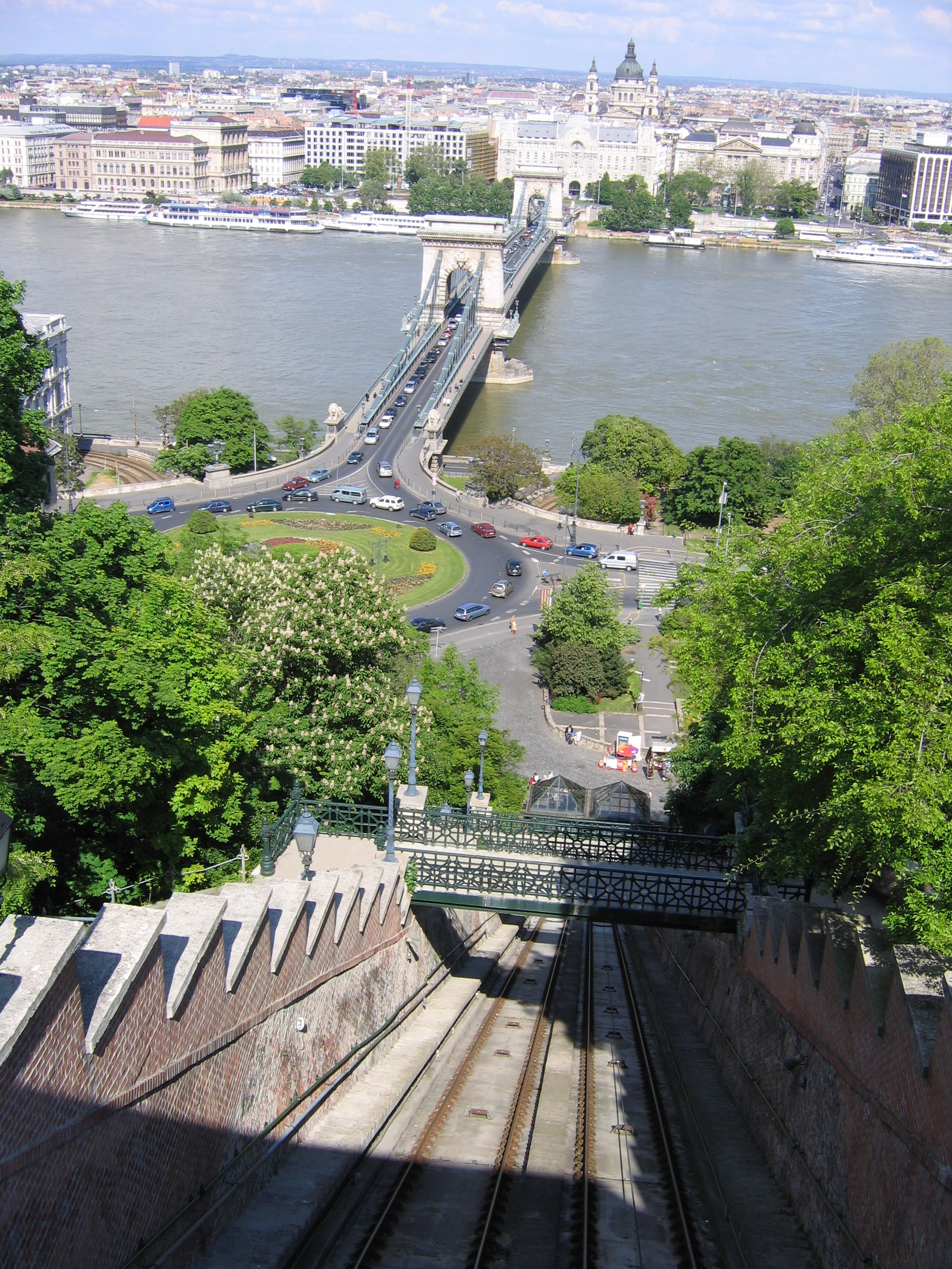 Funicular to Buda Castle (Budai Vár) Budapest, Hungary